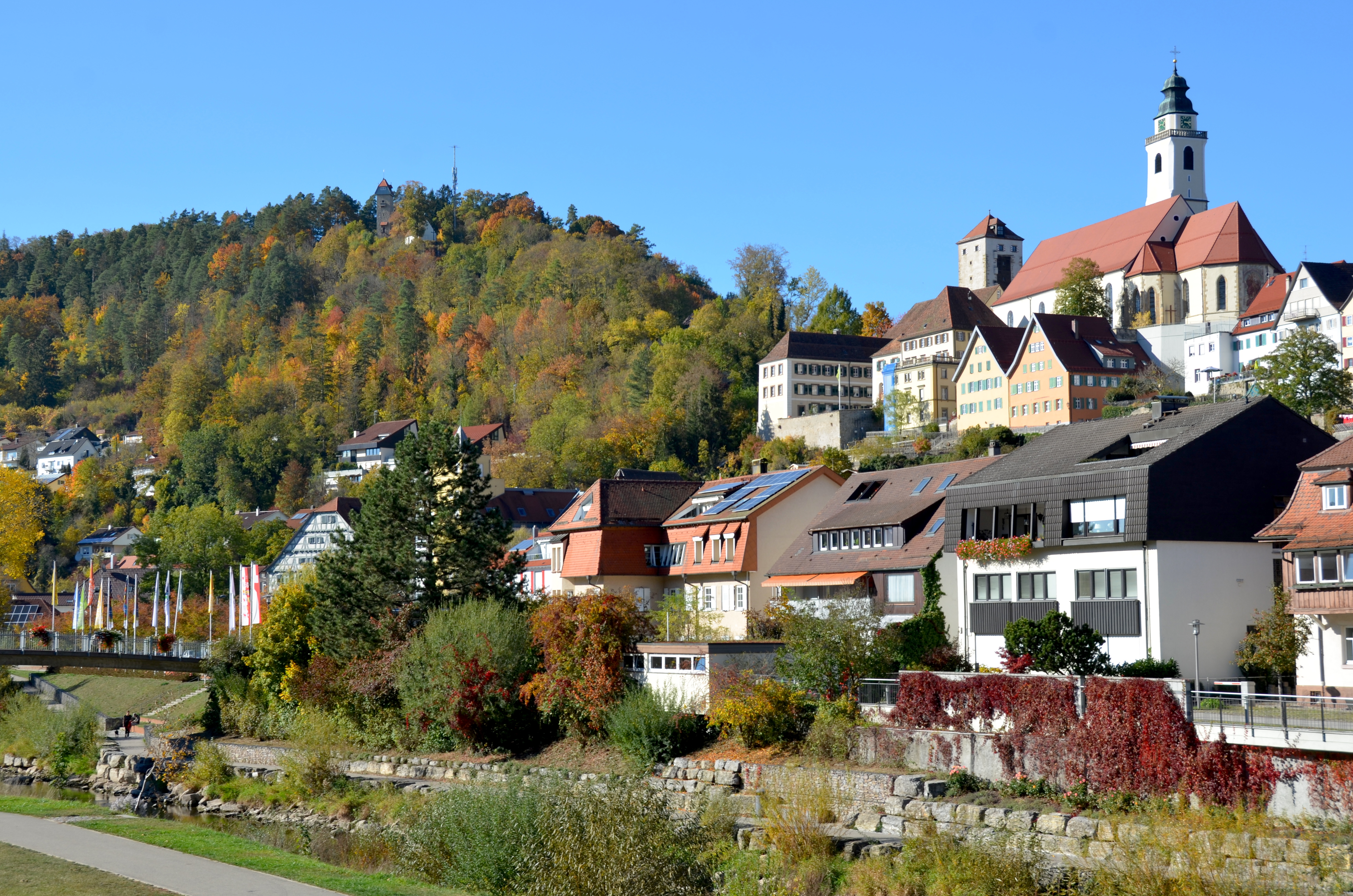 (NSG:BW-2.186)_Osterhalde und FFH-Gebiet Horber Neckarhänge Nr. 7517341 Horb am Neckar mit Stiftskirche, Schurkenturm und Schütteberg im NSG Osterhalde (2019)